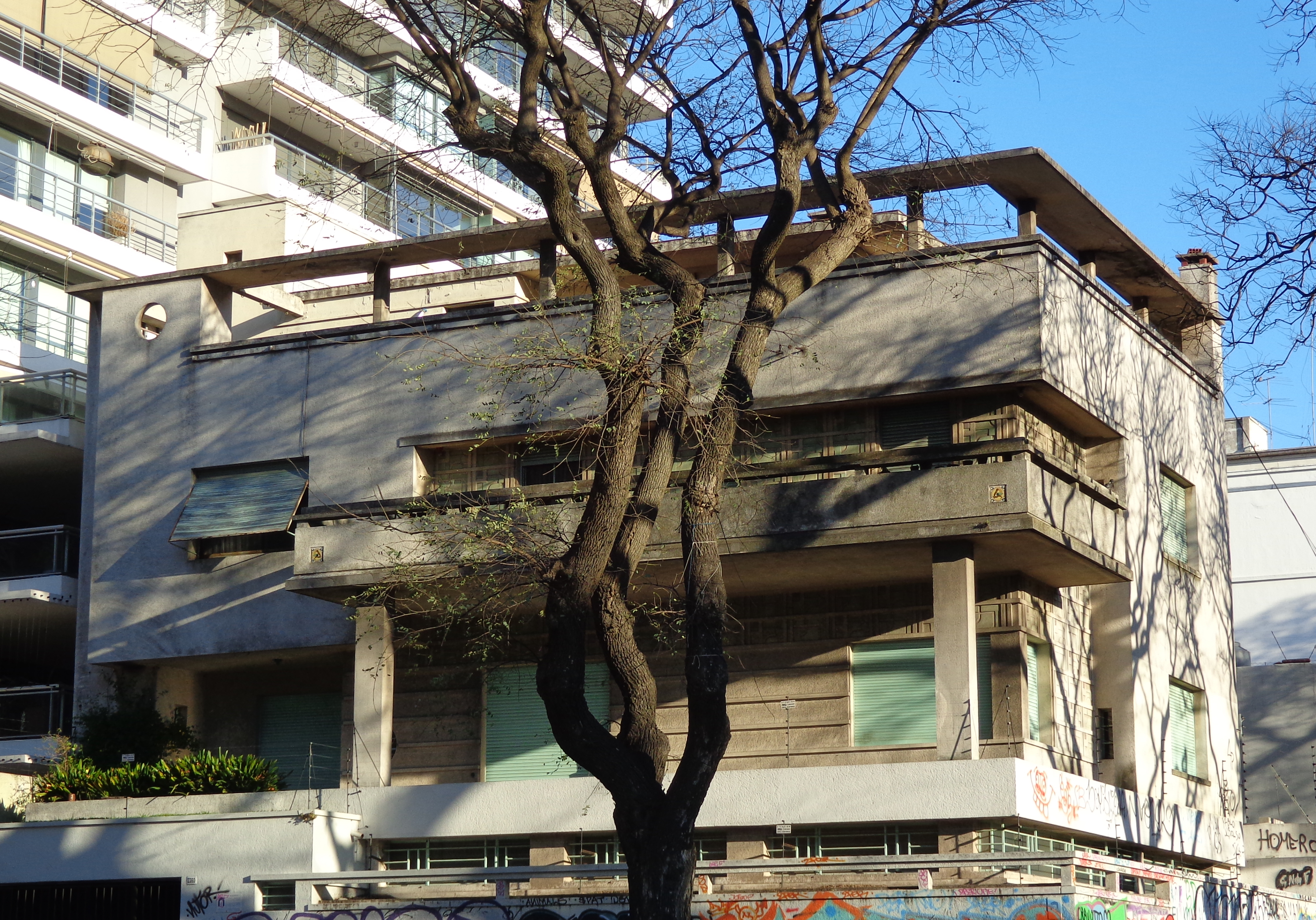 Vivienda - Estudio del Arq. Mauricio Cravotto con su equipamiento. Ubicada en el departamento de Montevideo